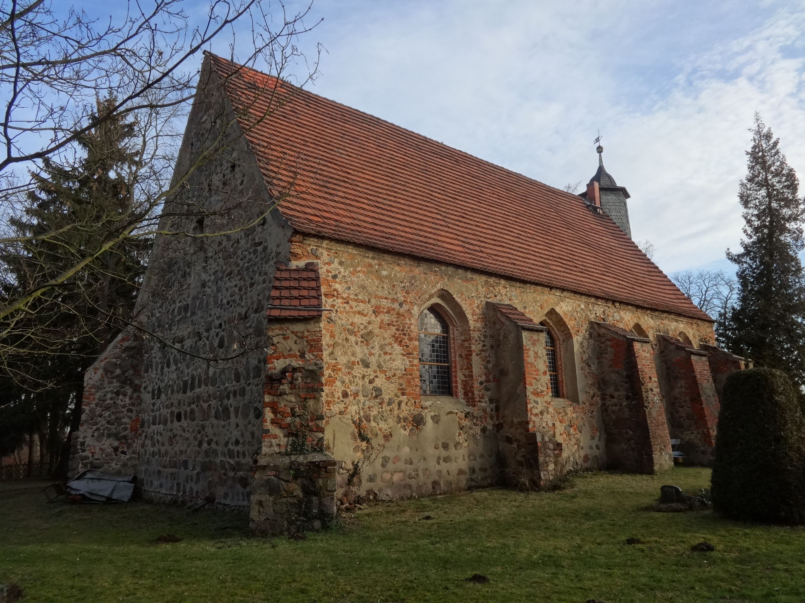 Die Sankt-Briccius-Kirche ist eine denkmalgeschützte Saalkirche aus dem 12. Jahrhundert in Bad Belzig im Landkreis Potsdam-Mittelmark in Brandenburg. Sie ist dem heiligen Brictius von Tours geweiht. Im Innern befinden sich ein Altaraufsatz sowie eine Kanzel aus dem 17. Jahrhundert. Auffällig ist, dass der Turm sich über dem Altarraum im Osten und nicht wie üblich im Westen befindet.